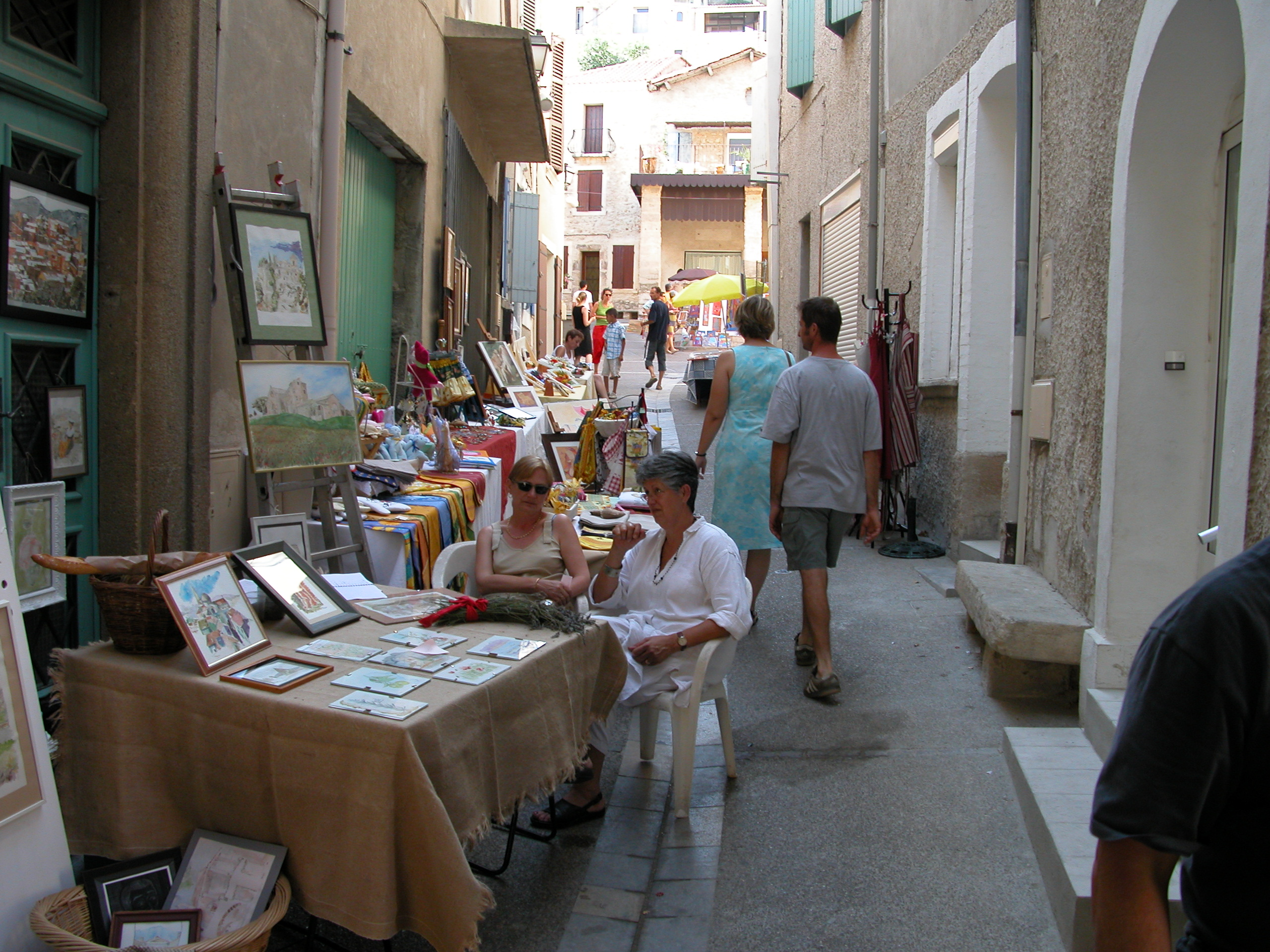 Peintres dans la rue